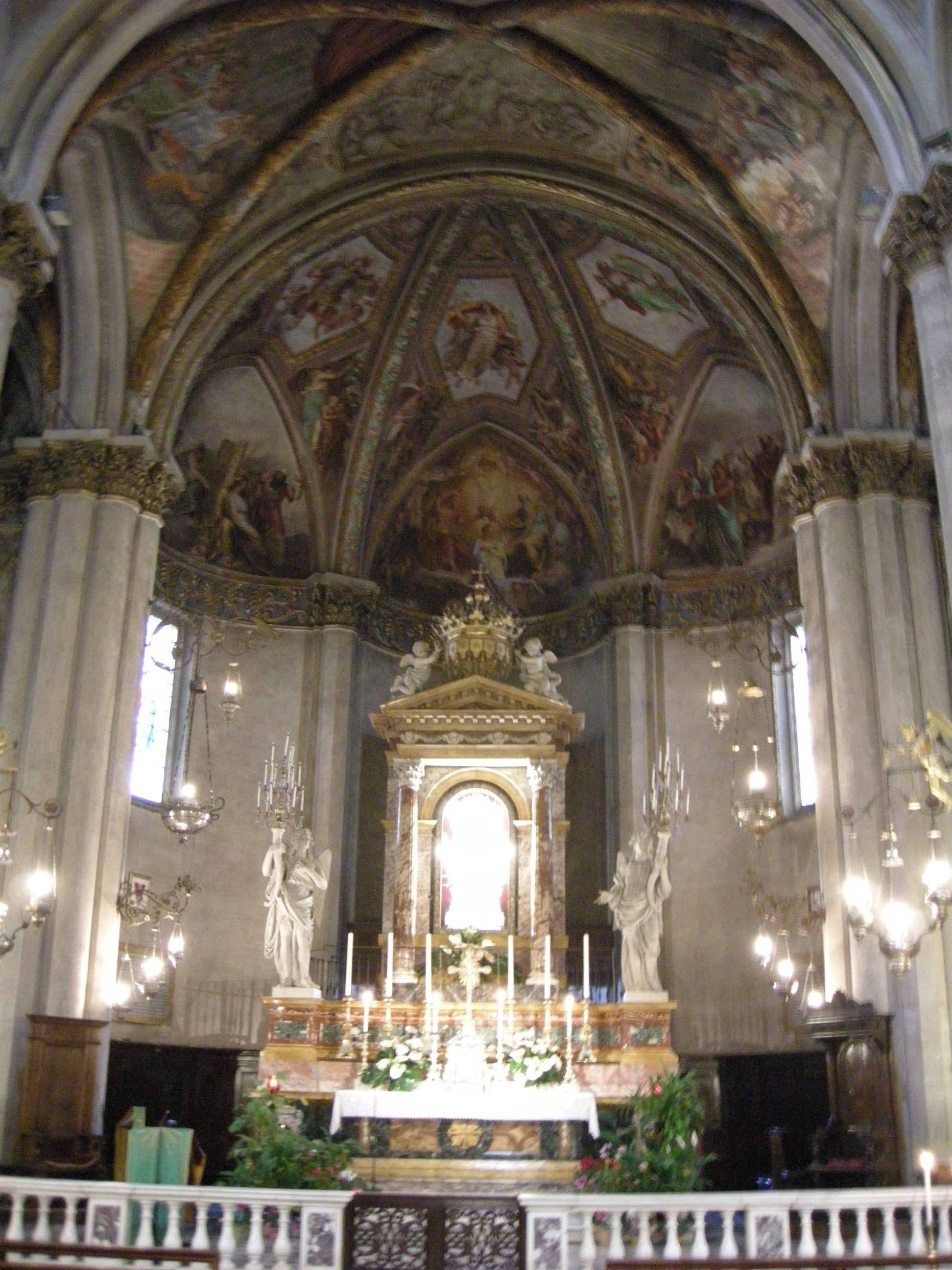 Duomo di arezzo, interno, cappella della madonna del conforto